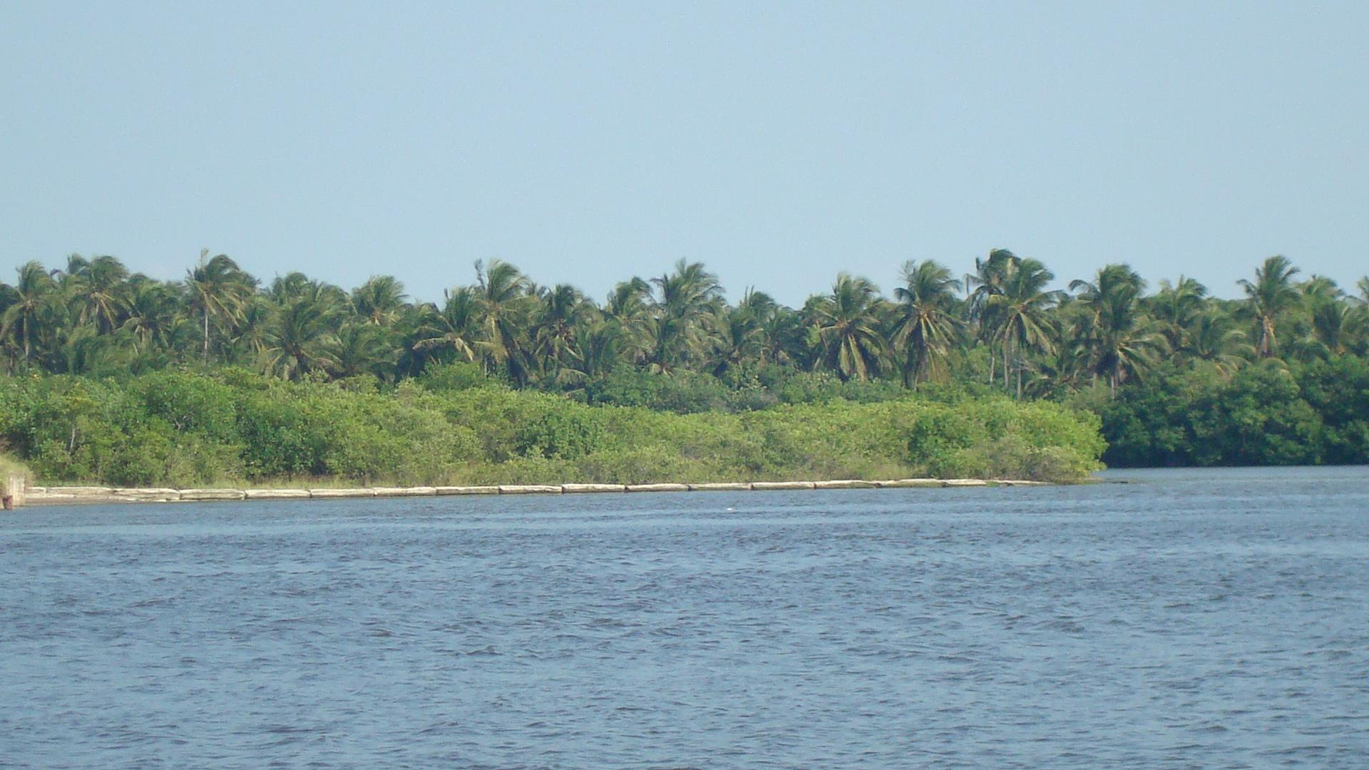 playas